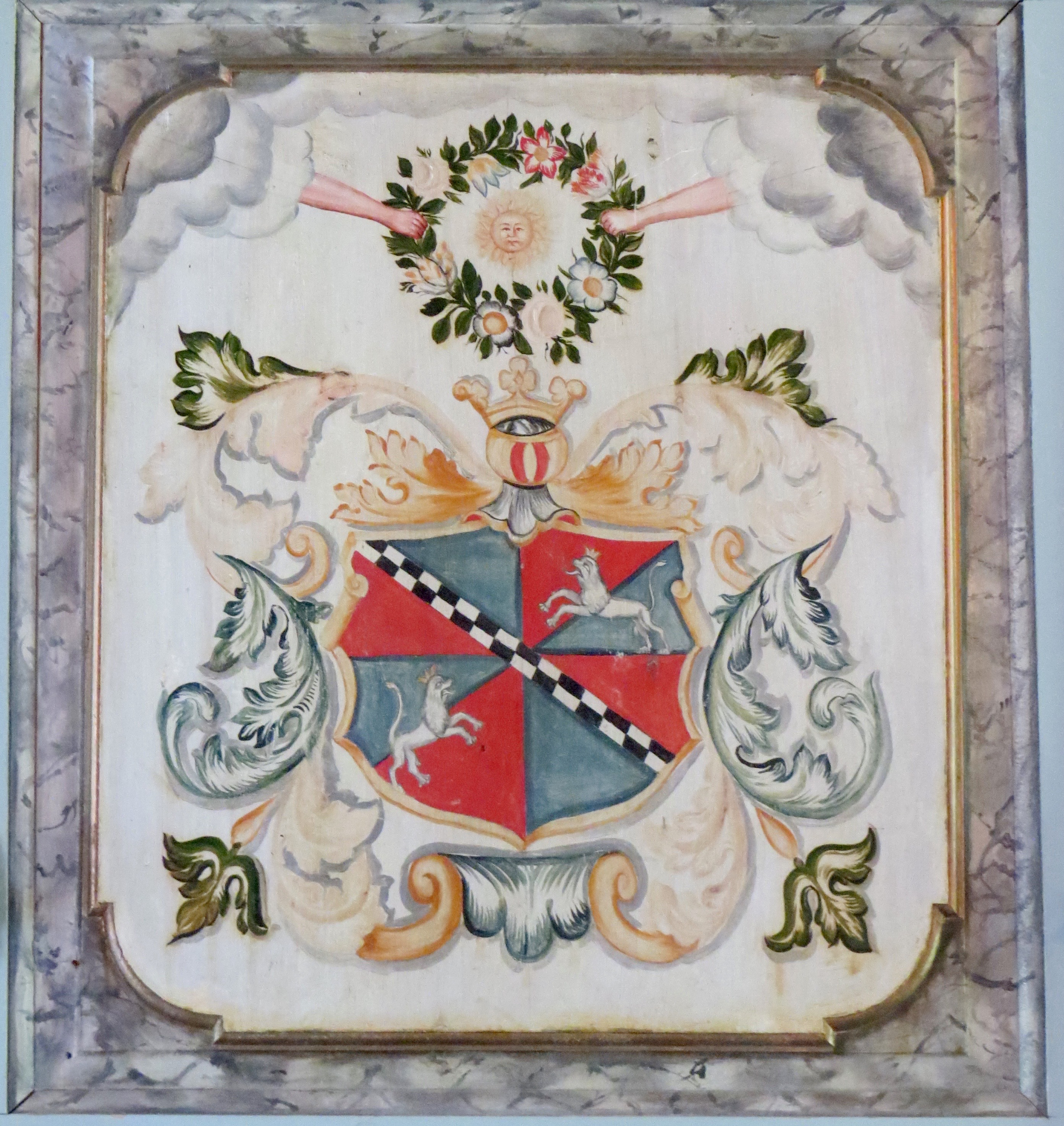 Anne Beate Rosenkrantz' (1707–1777) våben, Solum Kirke, Skien, Telemarken